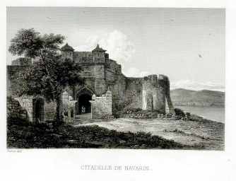 La citadelle de Navarin.